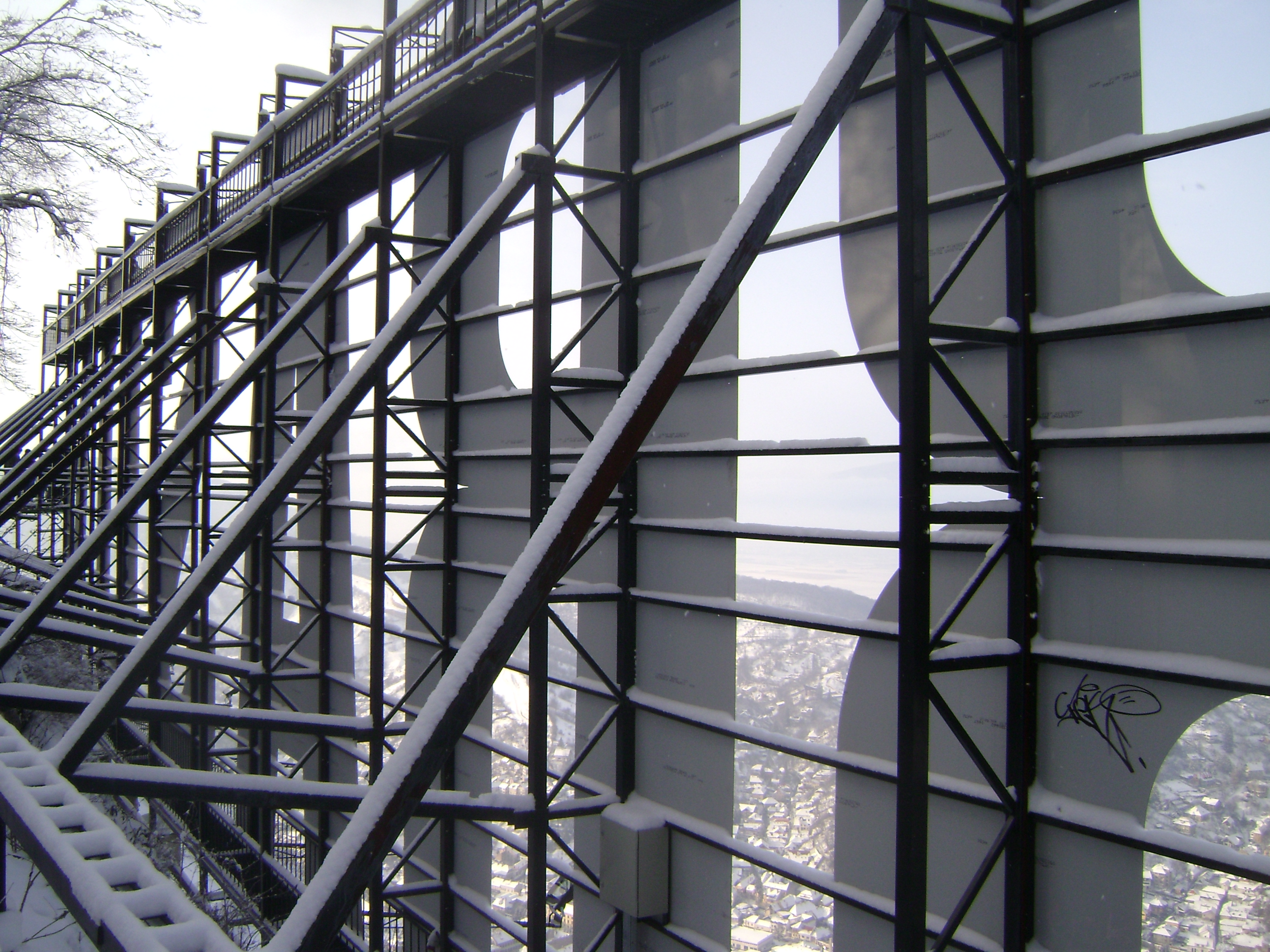 Braşov, Romania